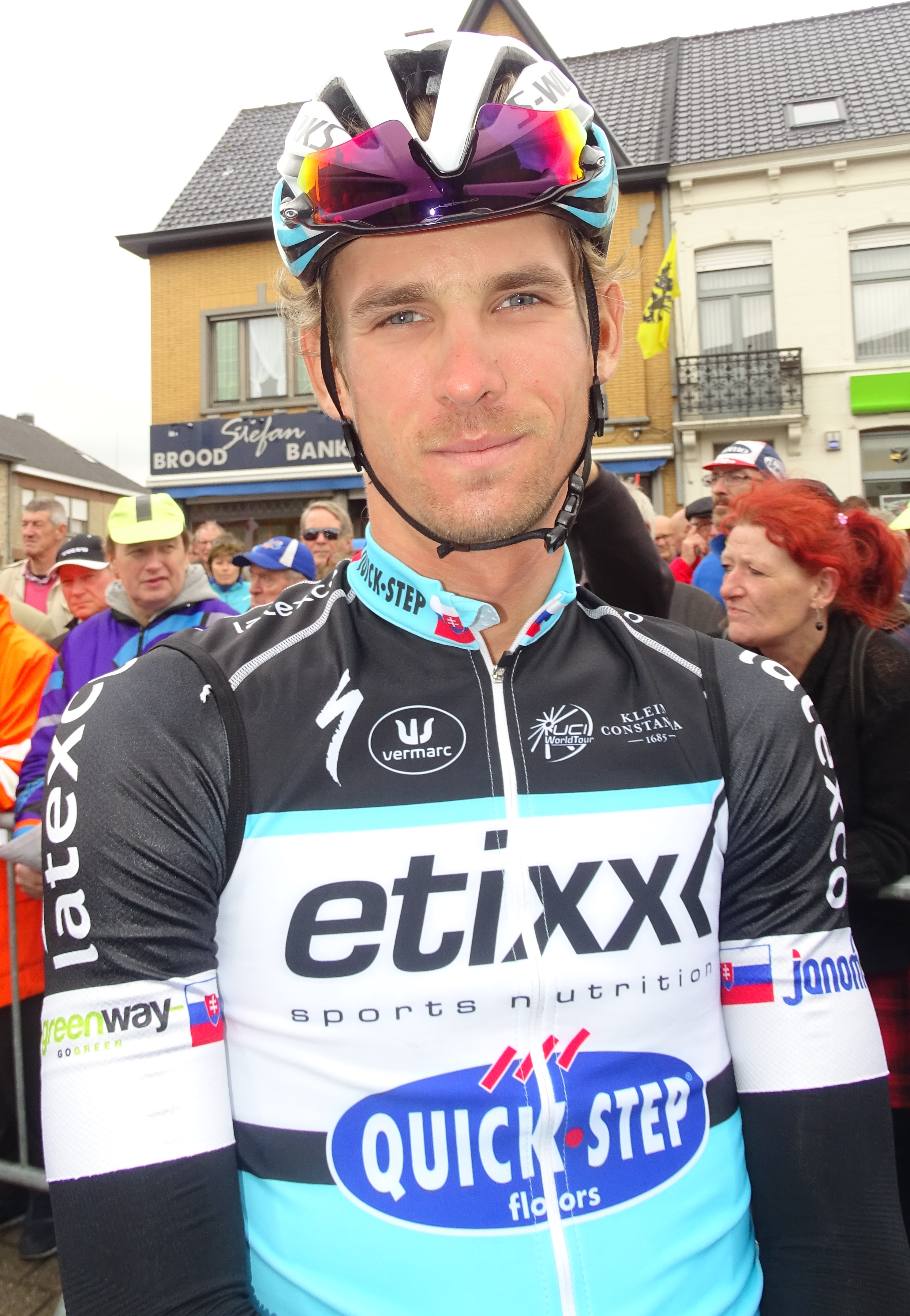 Reportage réalisé le vendredi 18 septembre à l'occasion de l'arrivée du Championnat des Flandres 2015 à Koolskamp (Ardooie), Belgique.